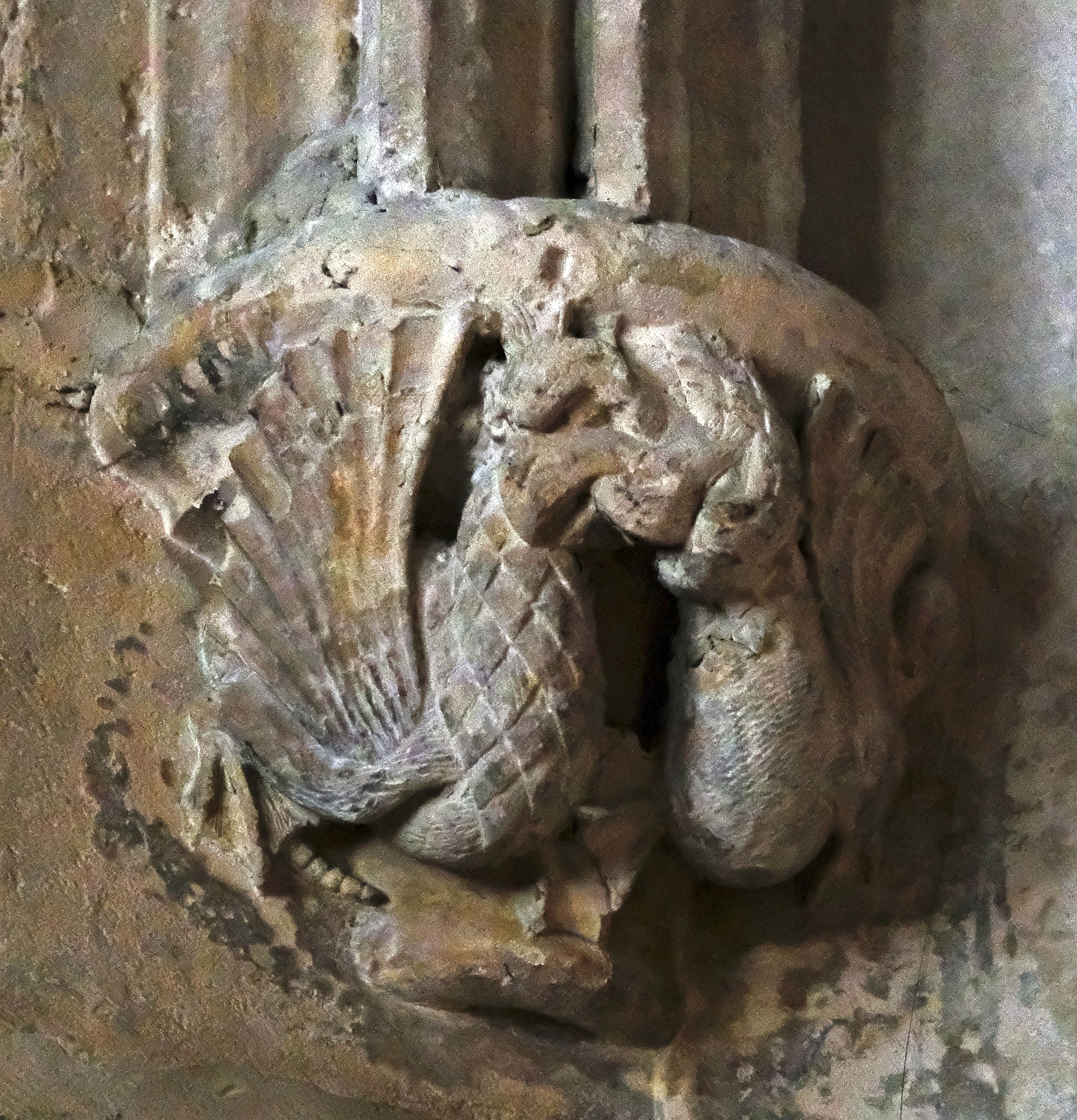 Église Saint-Médard (chapiteau) - Paris V